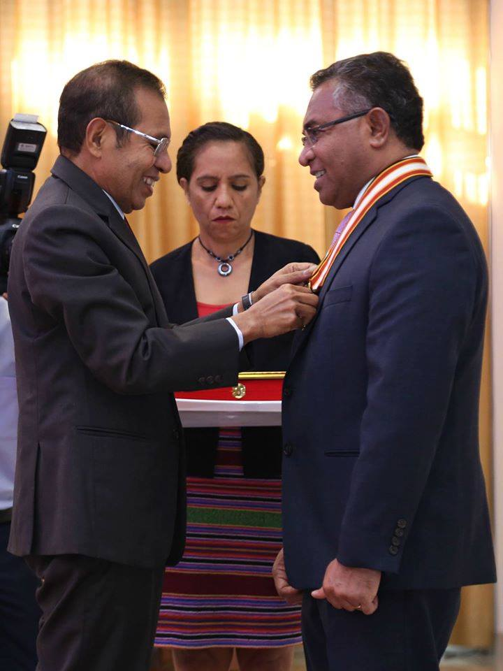 Taur Matan Ruak überreicht Rui Maria de Araújo den Ordem de Timor-Leste.